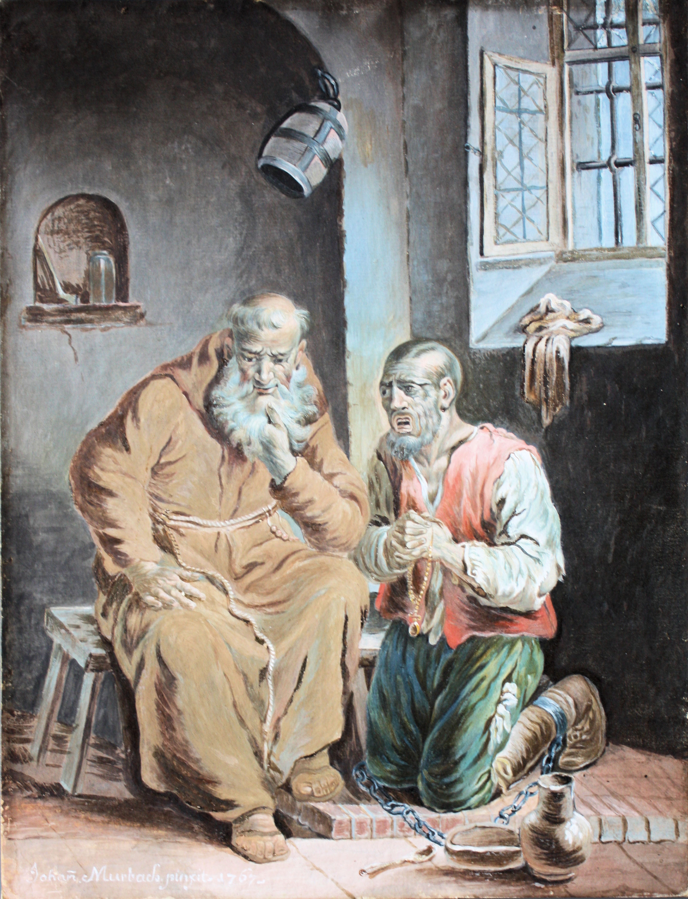 Johann Murbach, Oberrhein, Mitglied der Zunft zum Himmel im Basel, aktiv von 1767 bis 1778: Kapuziner bei der Abnahme der (letzten) Beichte, Gouache datiert 1767